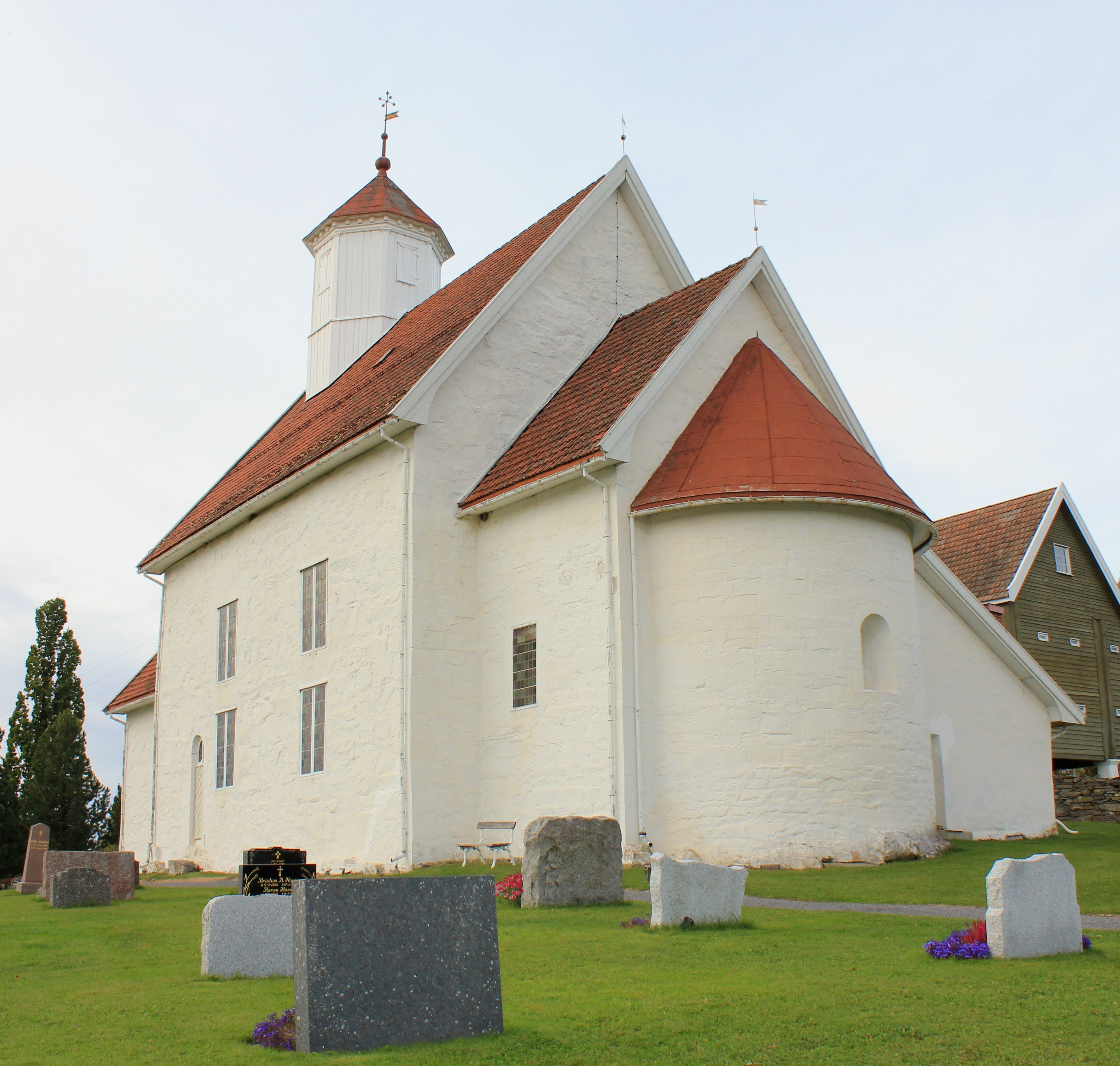 Balke kirke på Skreia, en middelalderkirke fra 1200-tallet.